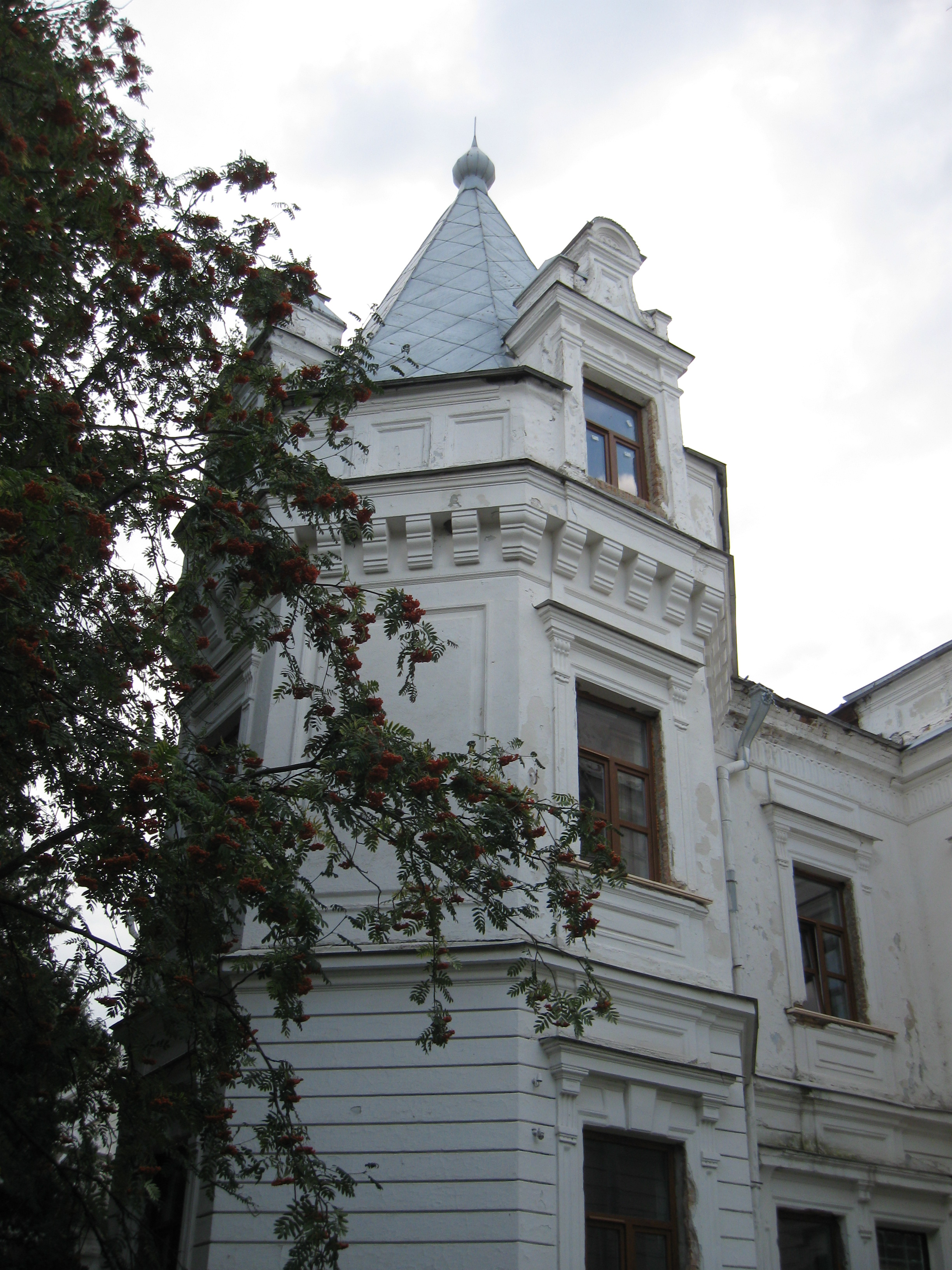 Андрушівський_палац_Терещенків_(9).jpg: Палац Терещенків у місті Андрушівці (райцентр Житомирської області), серпень 2010 року